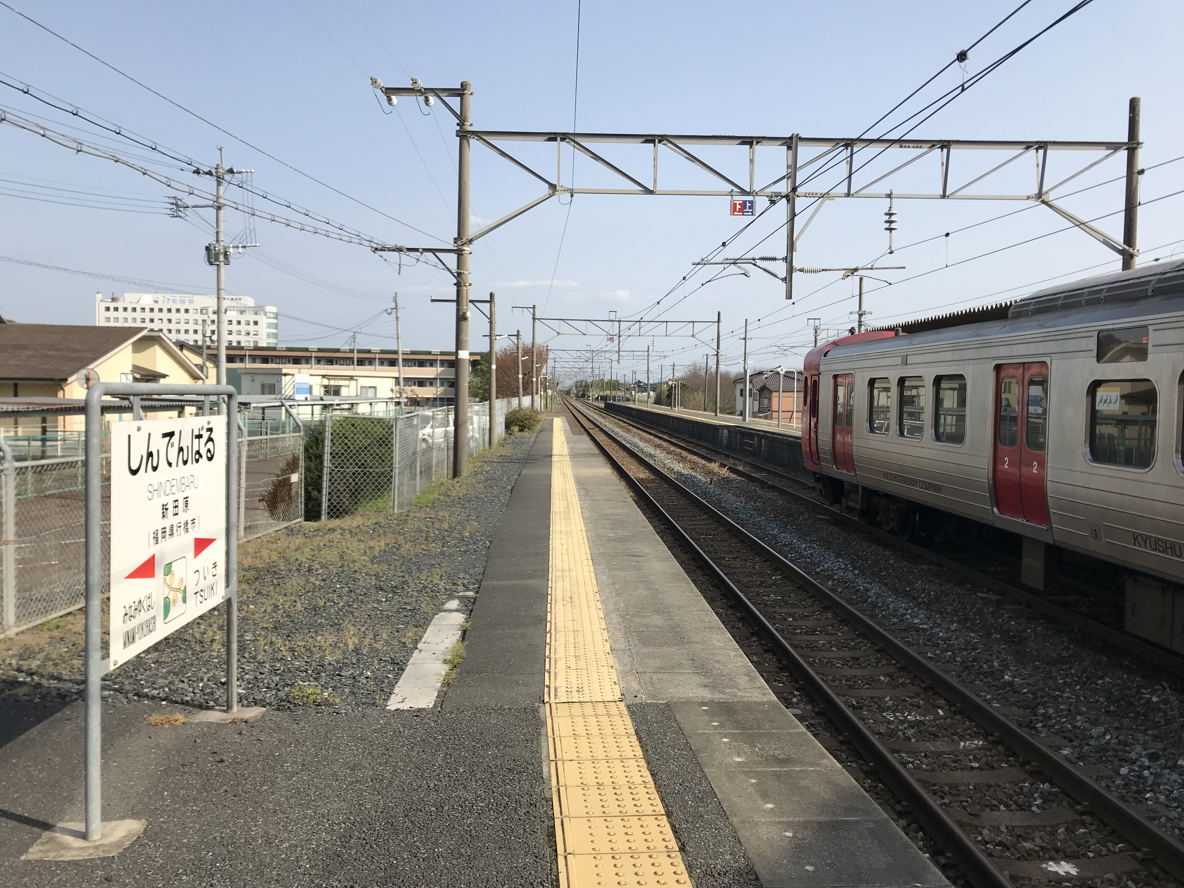 新田原駅のホーム(奥は築城方面)